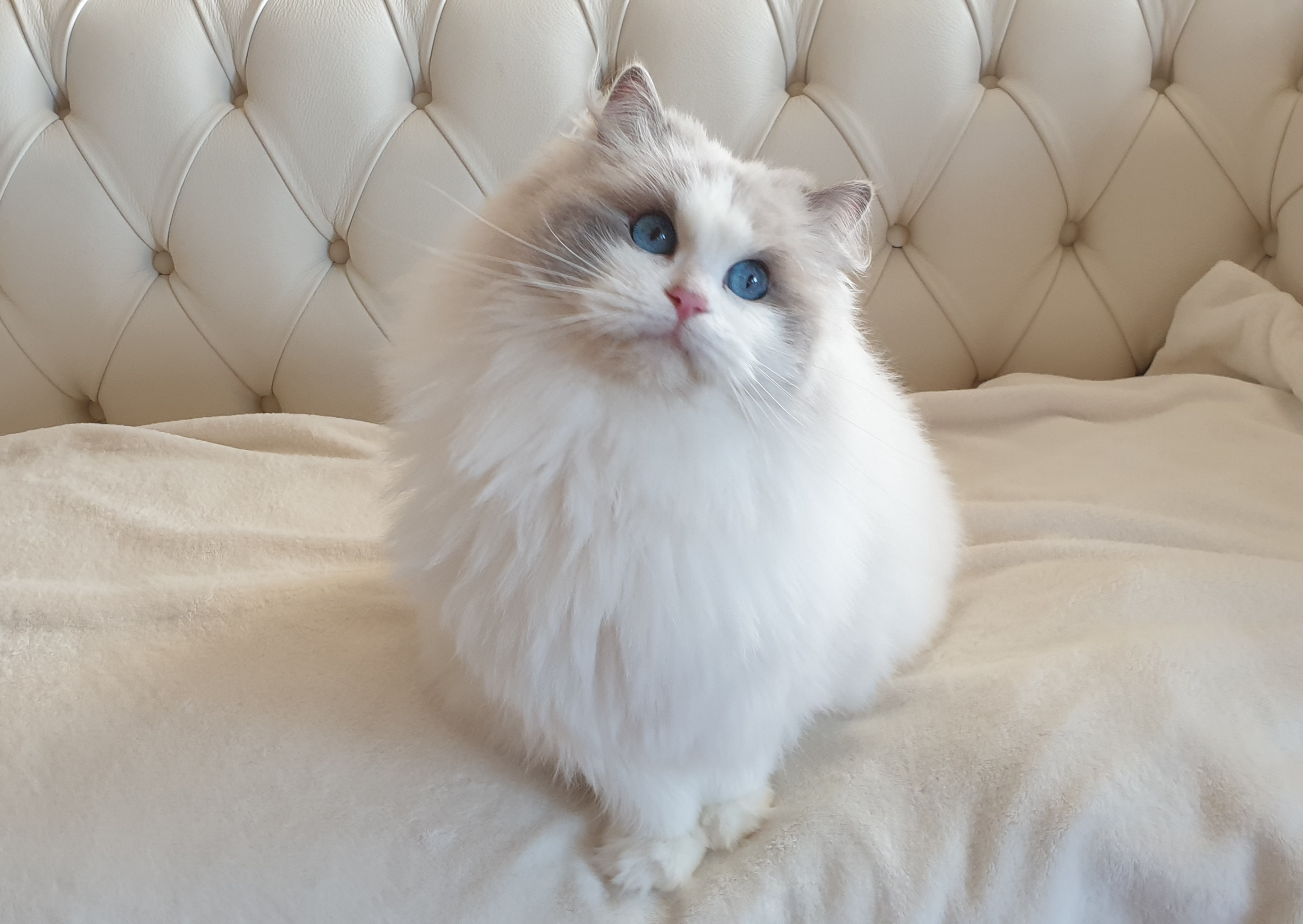 Diamanti Blu Afrodite